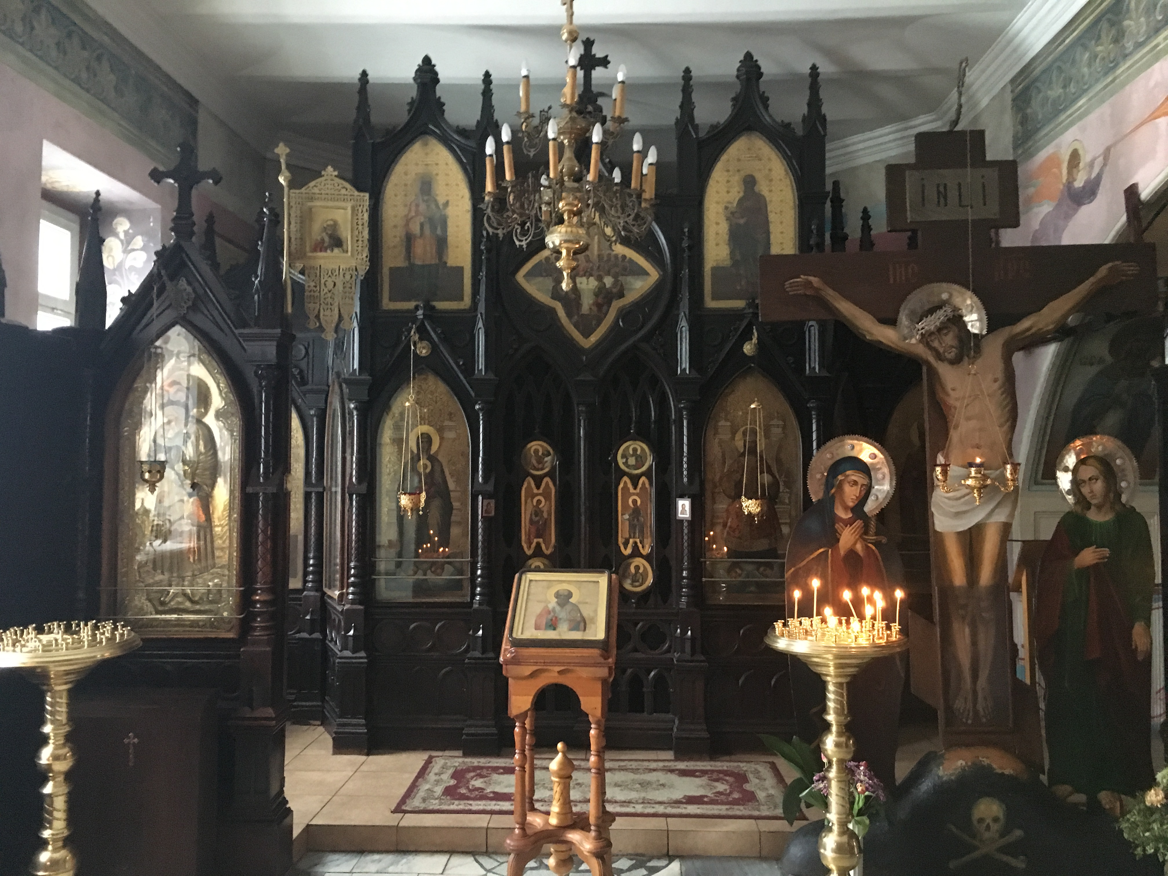 Фотография иконостаса правого предела Иоанно-Предтеченского кафедрального собора г.Екатеринбурга